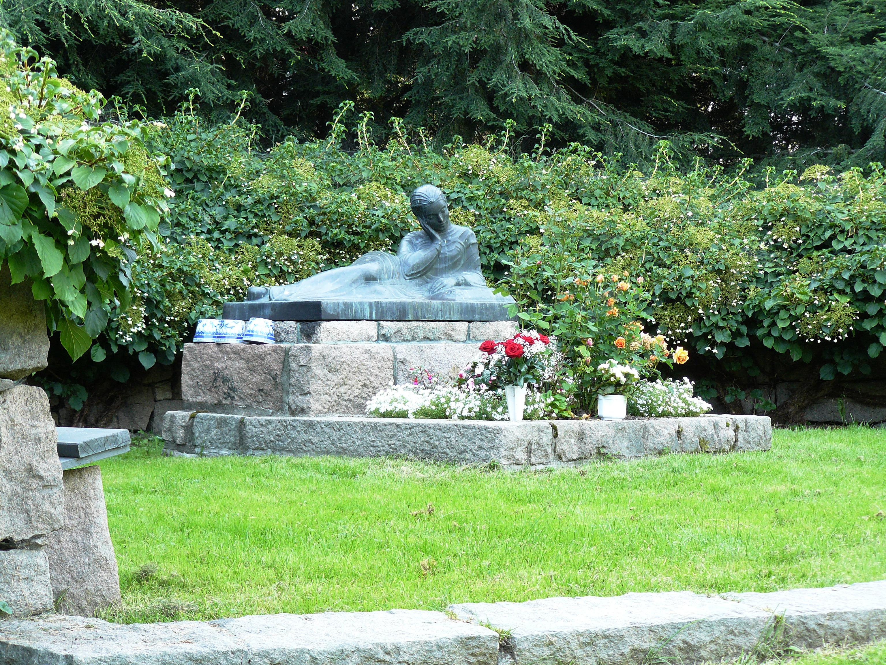 Marie Vigelands sculpture "resting woman"